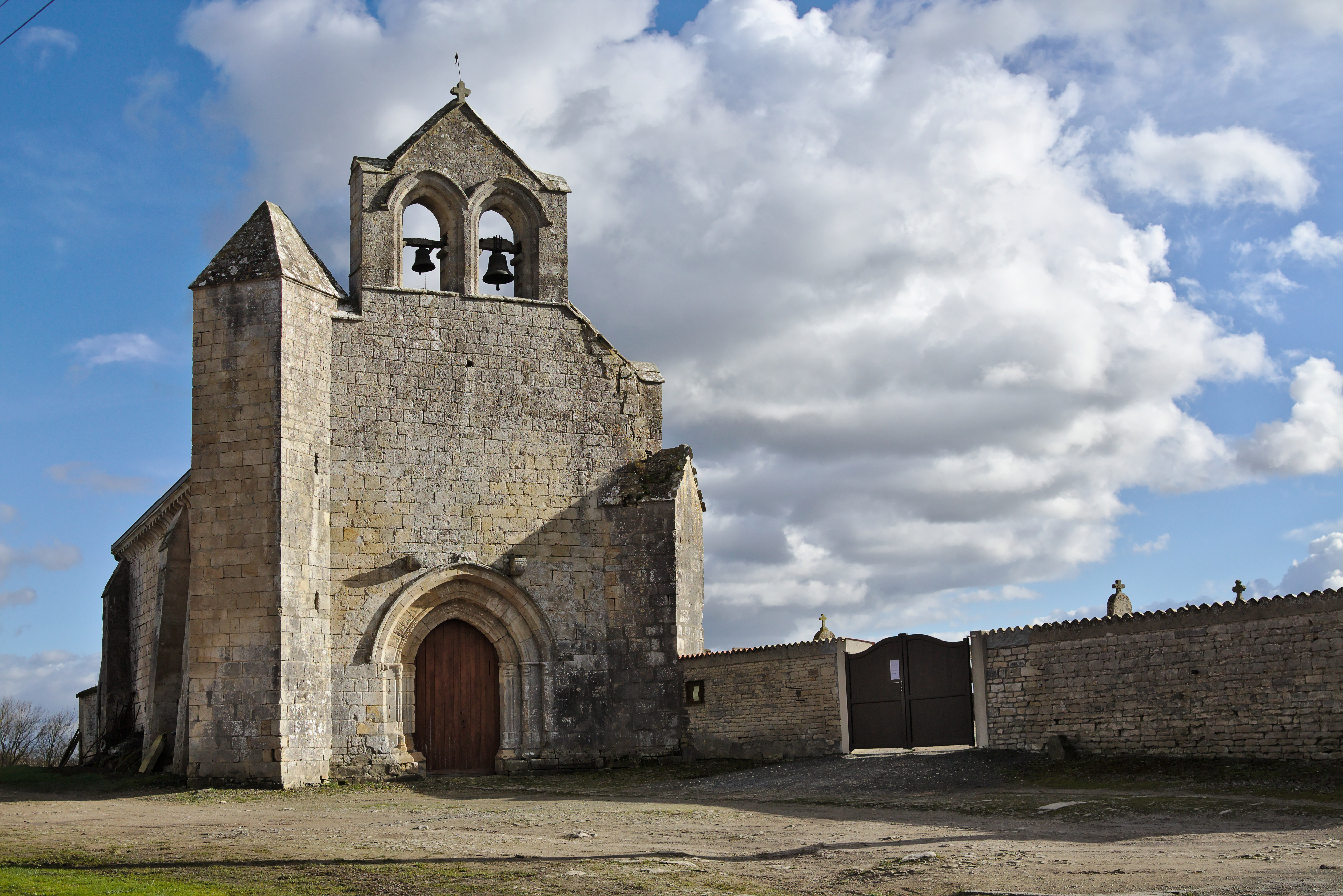 Église Notre-Dame, Séligné, Deux-Sèvres, Poitou-Charentes, France